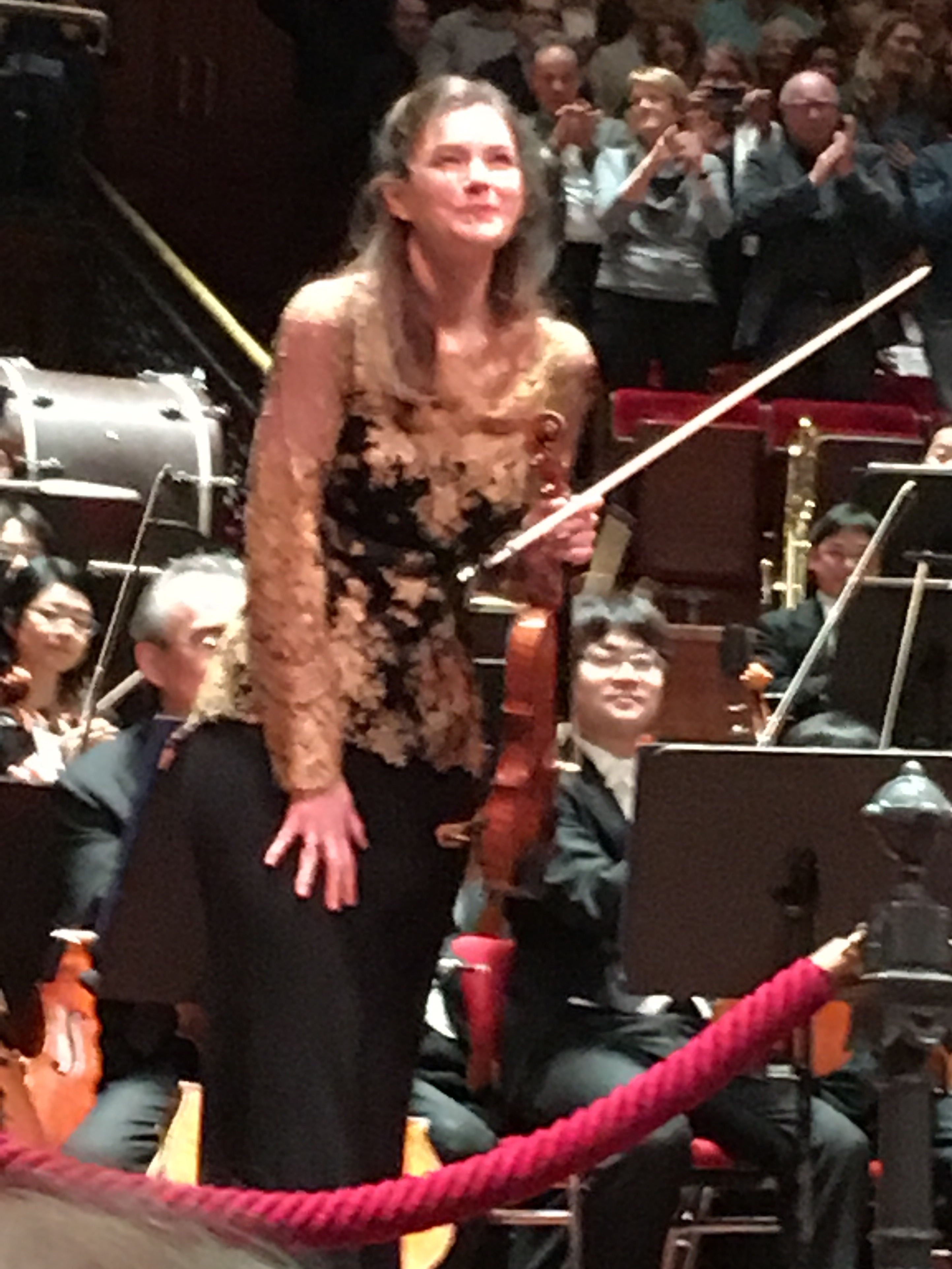 Live uitvoering Concertgebouw